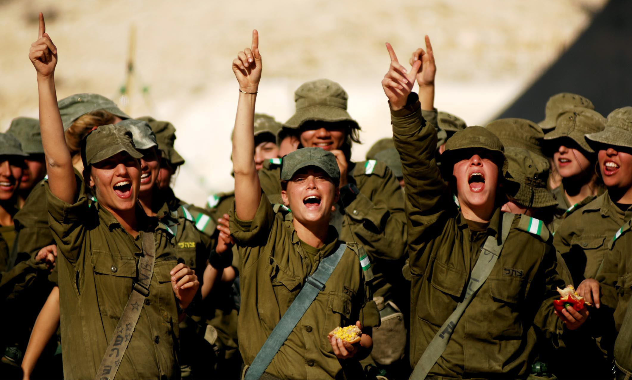 December 4, 2006. The Field Training Week in Southern Israel, part of the IDF Infantry Instructors course, includes individual and group drills, navigation practice, sleeping in the field and camouflage training. At the end of the course the female soldiers will be placed in different positions, instructing IDF Ground Forces. שבוע אימוני שדה הדרום הארץ מהווה חלק מקורס מדריכות חי"ר, וכולל תרגילי יחיד וקבוצה, אימוני ניווט, שינה והסוואה בשטח ועוד. בסוף הקורס מוצבות בתפקידים שונים כמדריכות בזרוע היבשה.